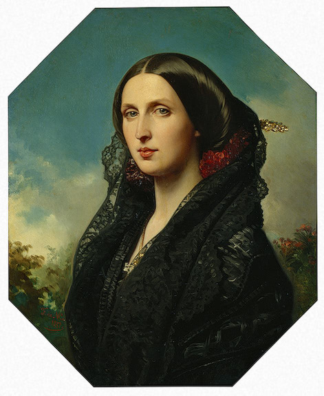 Княгиня Мария Ильинична Голицына, ур.Долгорукова (1822-1907), дочь генерал-лейтенанта, генерал-адъютанта князя И.А. Долгорукова; с 1842 года была замужем за камергером Михаилом Александровичем Голицыным (1804-1860), во втором браке за дипломат Н.Д.Остен-Сакеном (1831-1917).